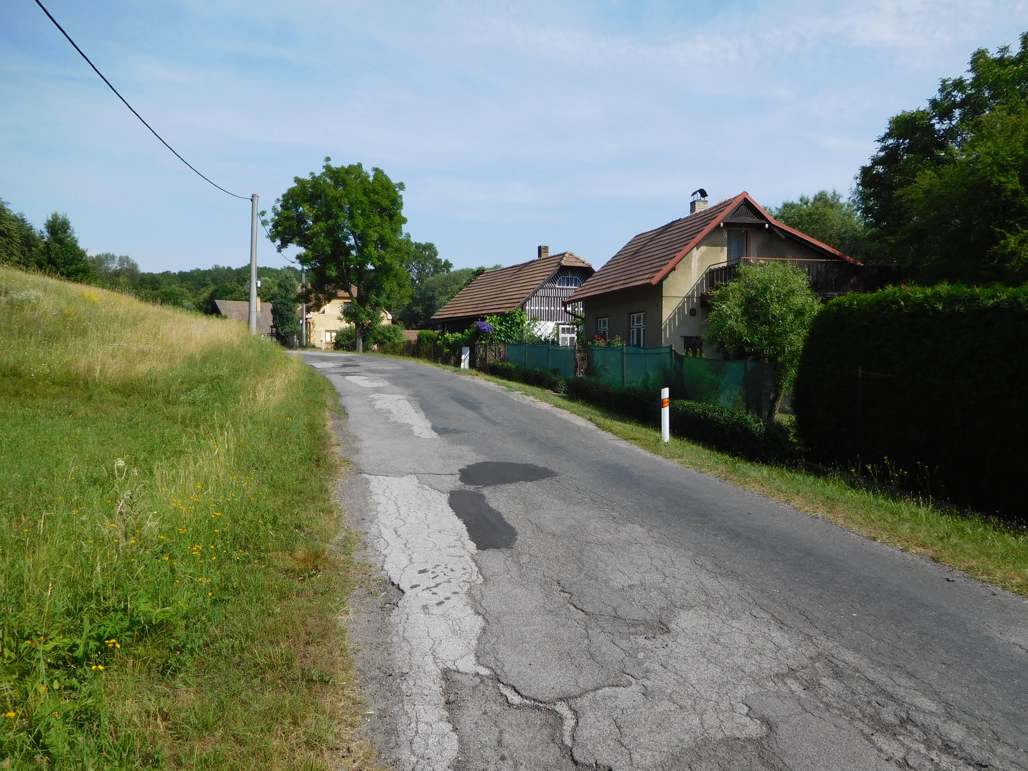 Záhuby - střed obce